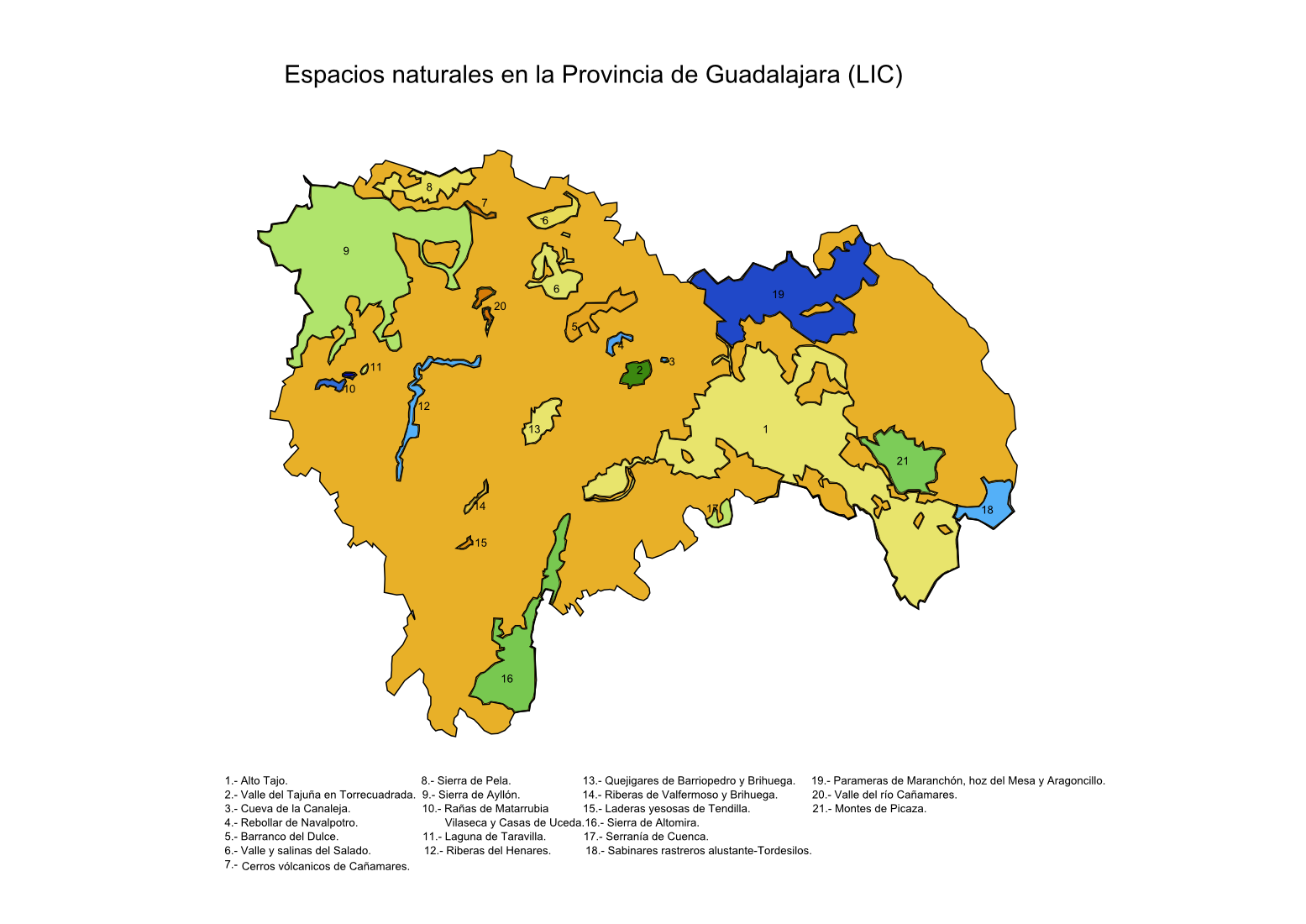 Lugares de Importancia Comunitaria (LIC), en la provincia de Guadalajara, España.